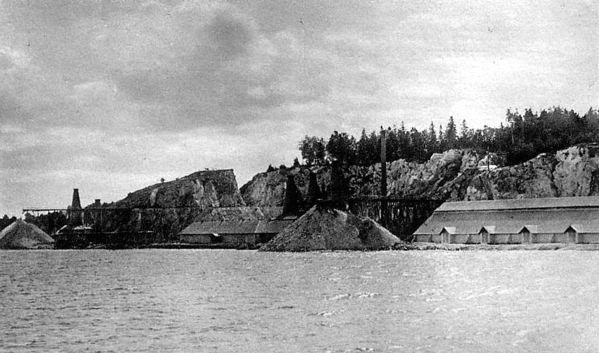 Oaxens kalkbruk på 1910/1920-talet. Foto efter gammalt vykort.